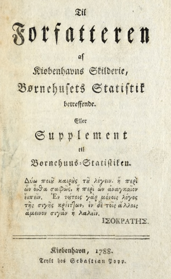 Titelblad fra «Til Forfatteren af Kiøbenhavns Skilderie, Børnehusets Statistik betreffende, eller et Supplement til Børnehuus-Statistiken», Kiøbenhavn, trykt hos Sebastian Popp, 1788